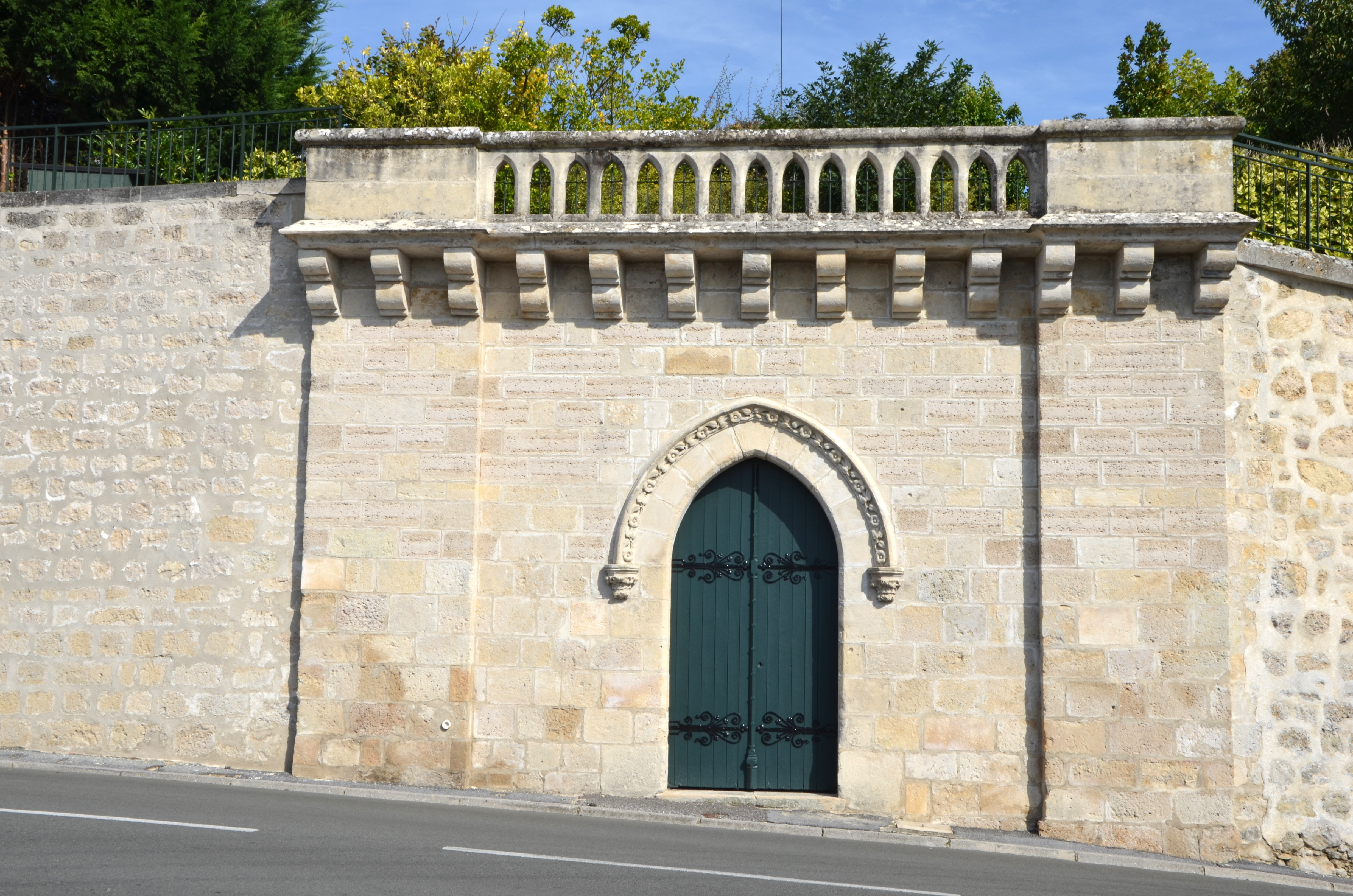 Ancien porche de l'abbaye Saint-Jean aujourd'hui intégrée dans les batiments de la Préfecture Rue de l Arquebuse Laon (Aisne, France)